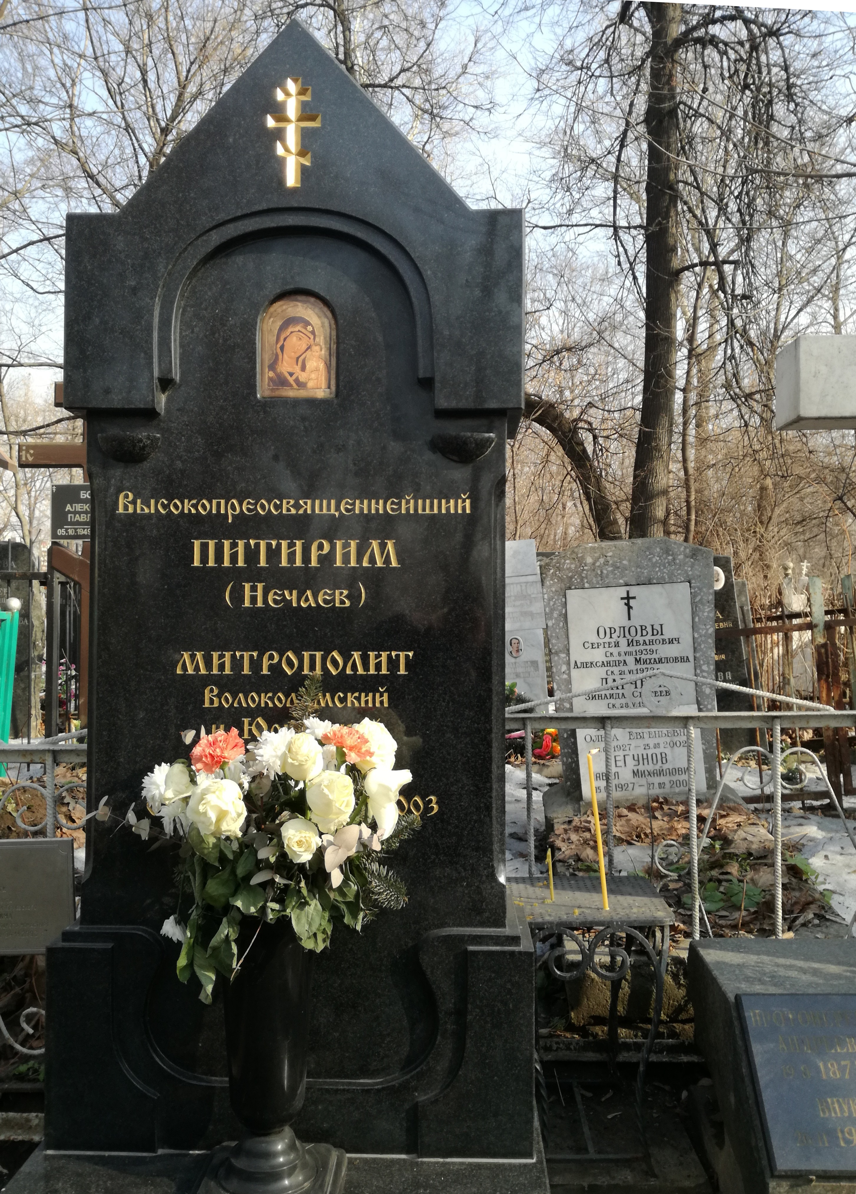 Даниловское кладбище